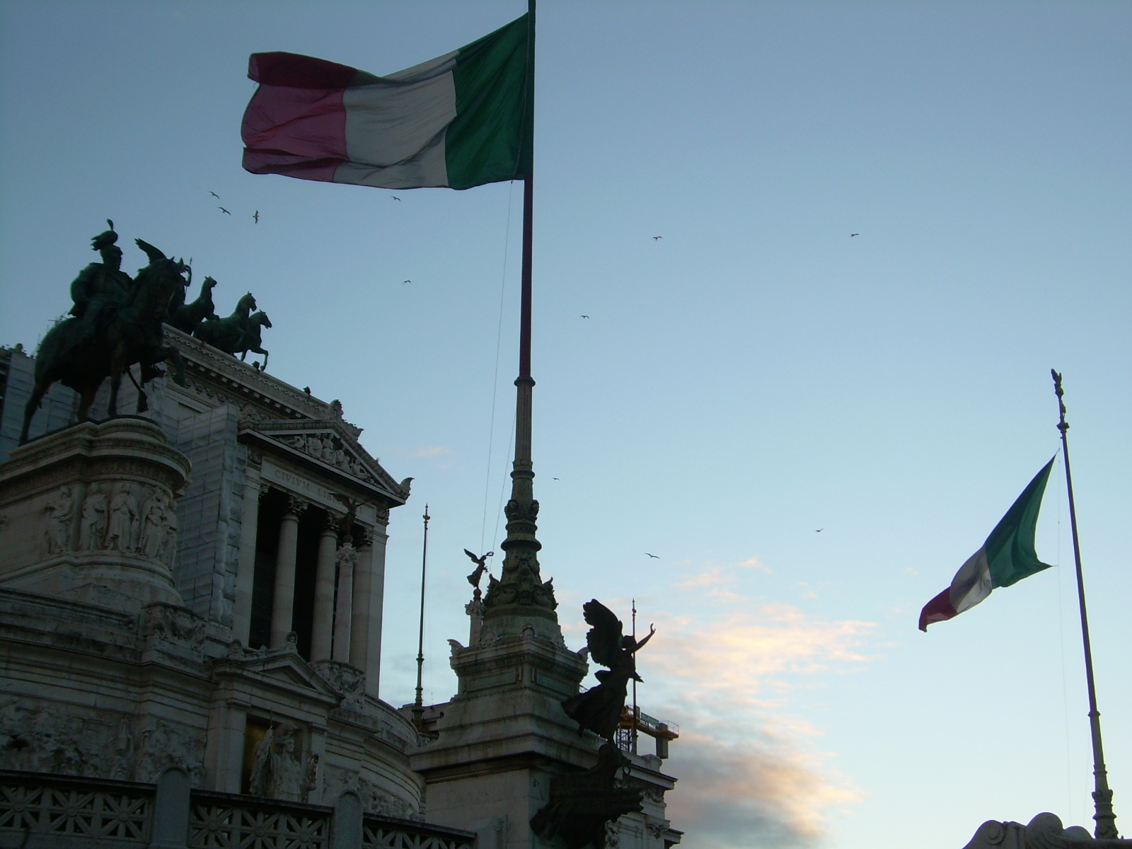 Vittoriano - Tramonto con volo di gabbiani